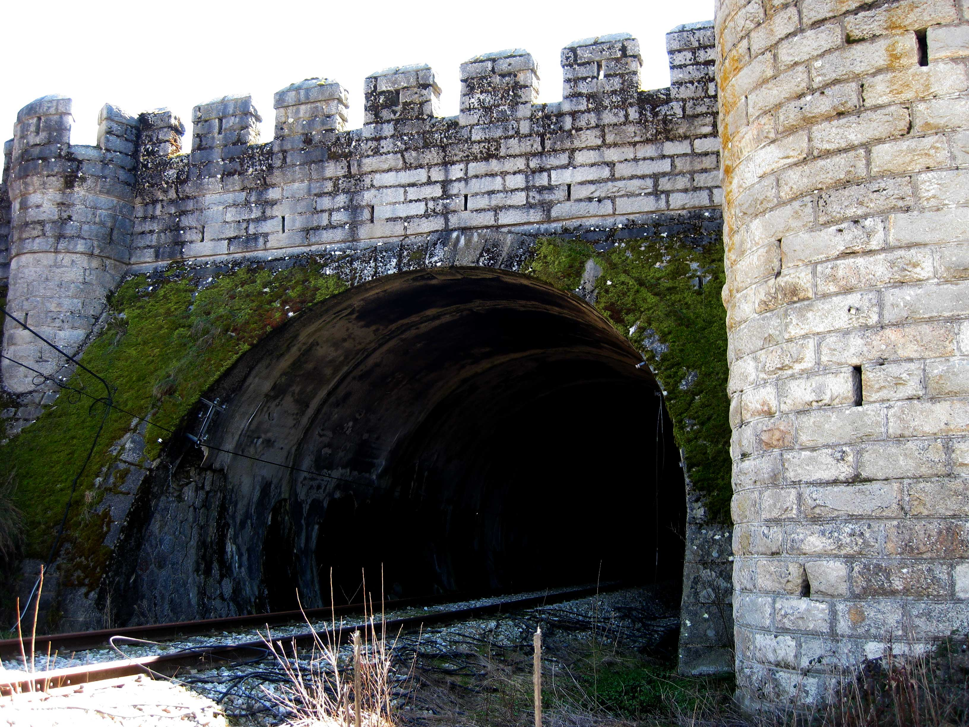 Construido en 1933.